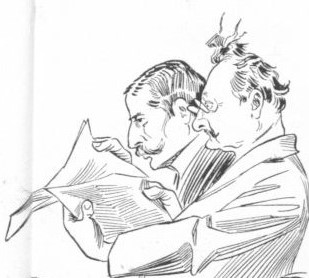 Zygmunt Skwirczyński Heinrich Berté (hinten) 1911 rechts Lindau (unklar, wer damit gemeint ist)